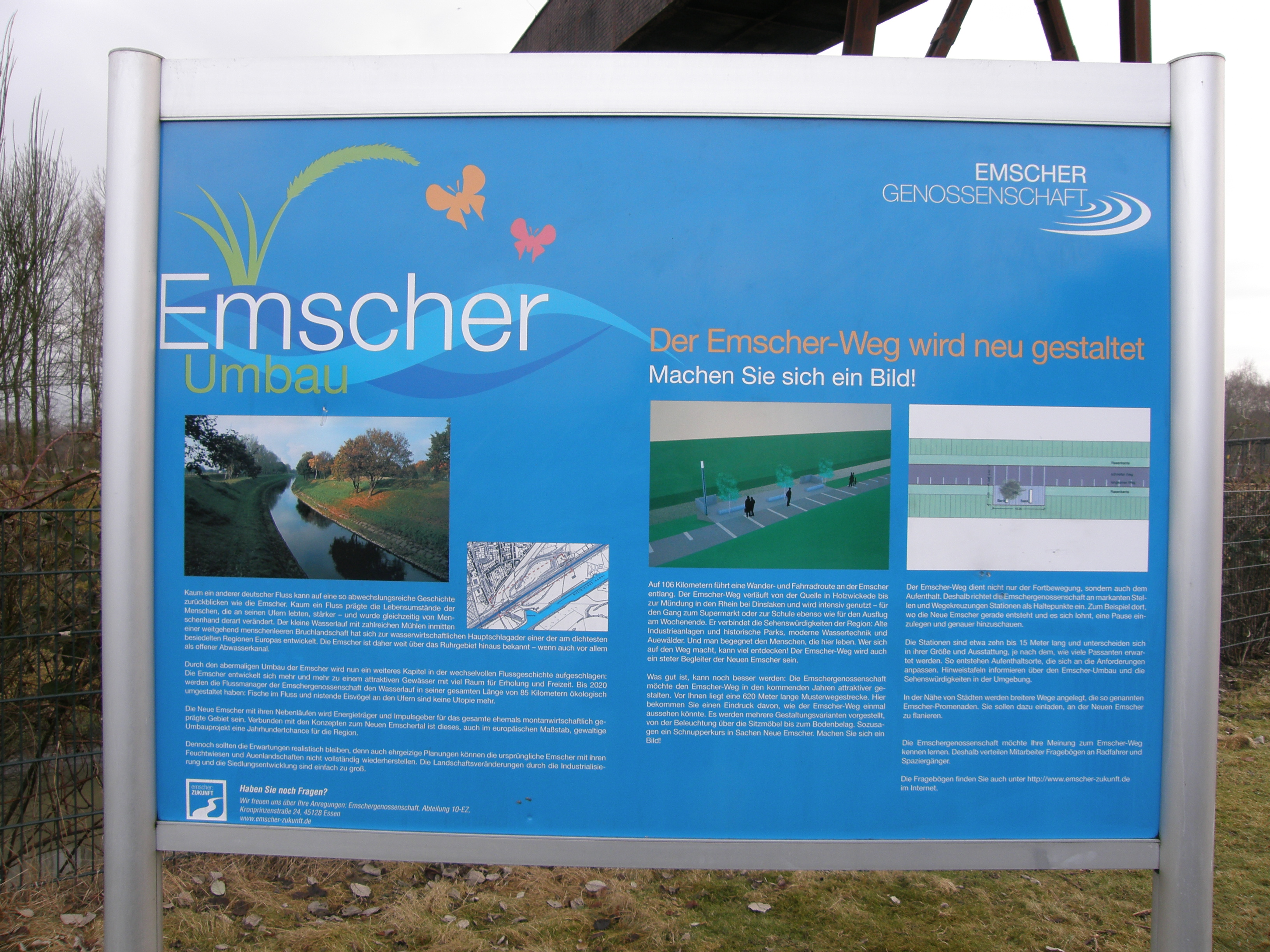 Informationsschild der Emschergenossenschaft zum Umbau der Emscher und zur Neugestaltung des Emscherweges am Pumpwerk Horst im Nordsternpark